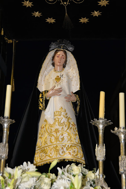 Virgen Dolorosa Lujan